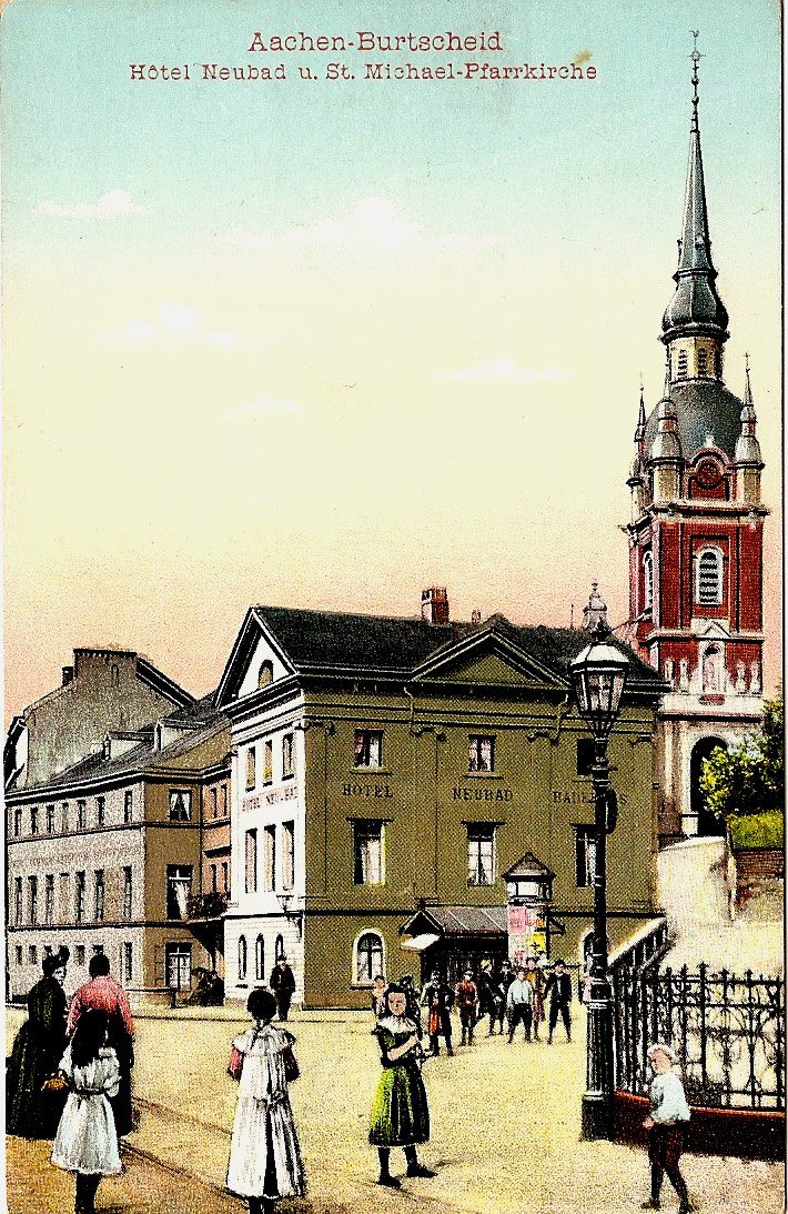 Burtscheider Markt mit Blick auf die St. Michael-Pfarrkirche und das Hotel "Neubad". Im Vordergrund befindet sich der öffentliche Thermalwasserbrunnen.